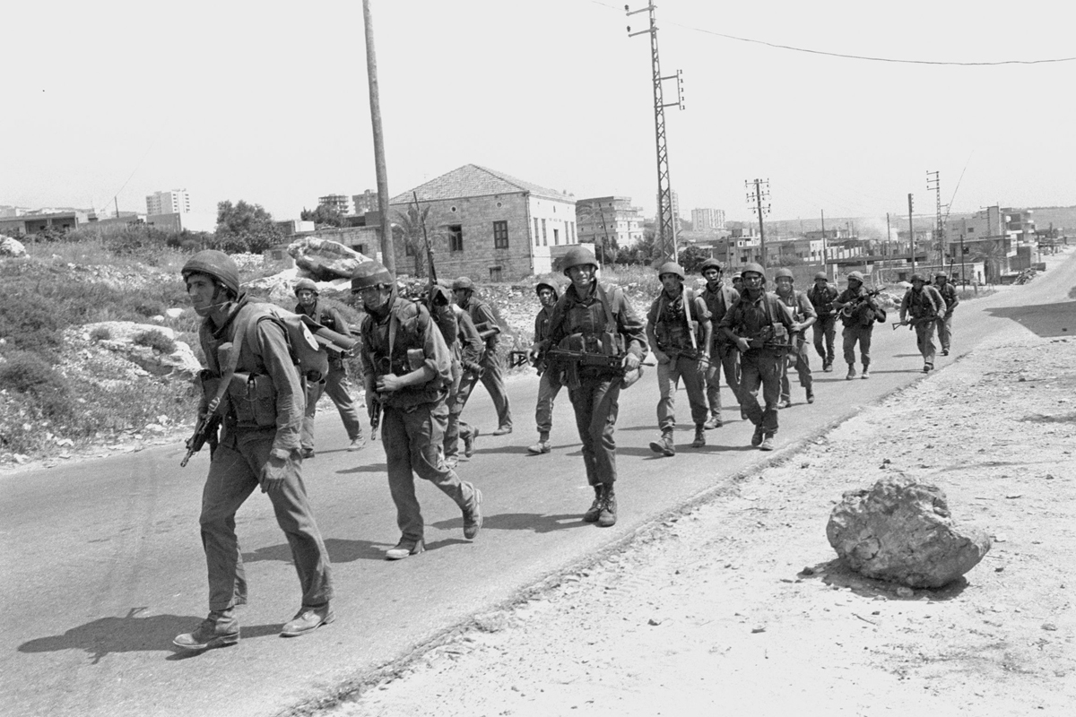 כוחותינו במלחמת שלום הגליל, 1982